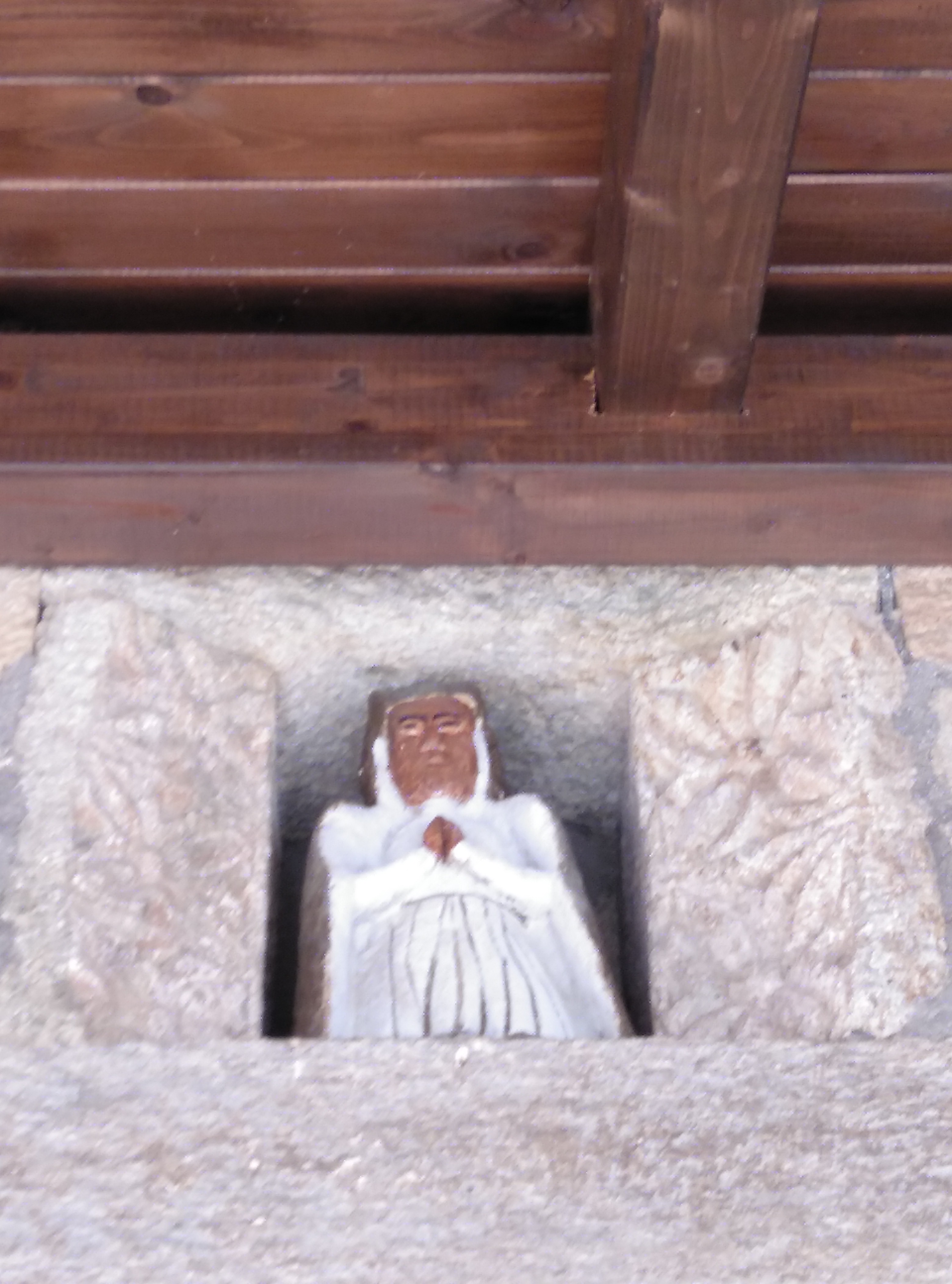 detalle de virgen en iglesia Doney de la Requejada